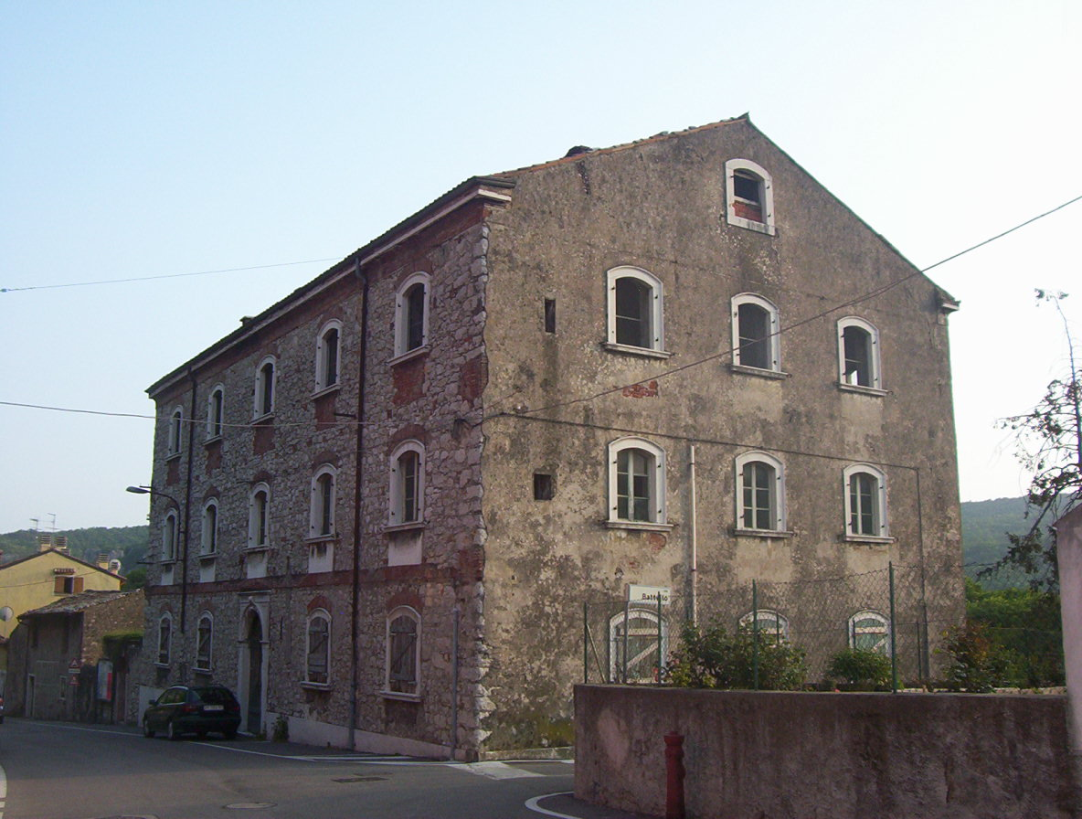 Vecchio Comando Militare Austriaco (poi italiano) a Ceraino.